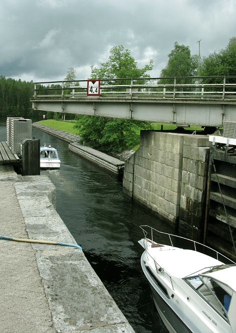 Kerman kanava Heinävedellä Etelä-Savossa.